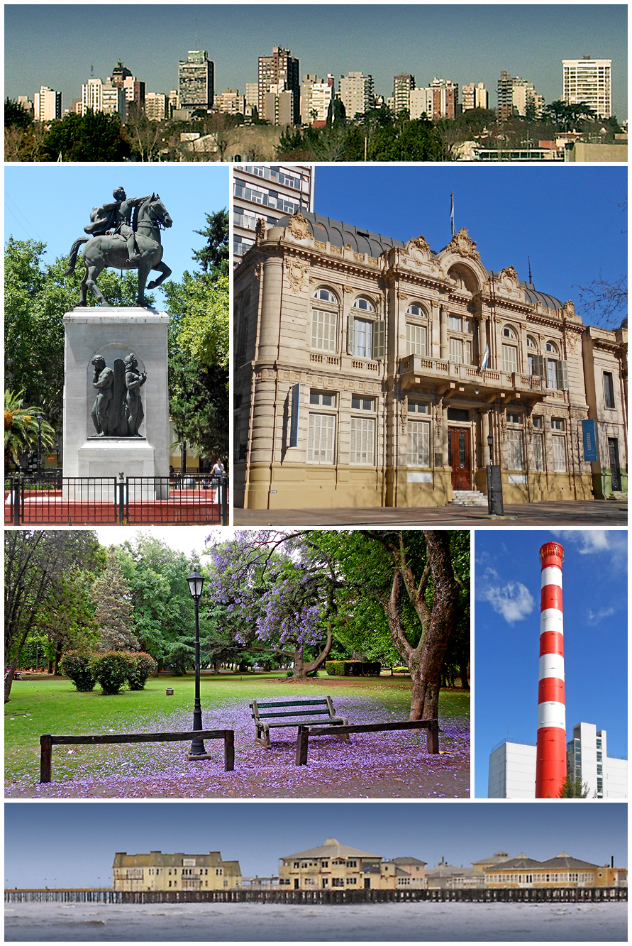 Mosaico fotográfico de la ciudad de Quilmes.